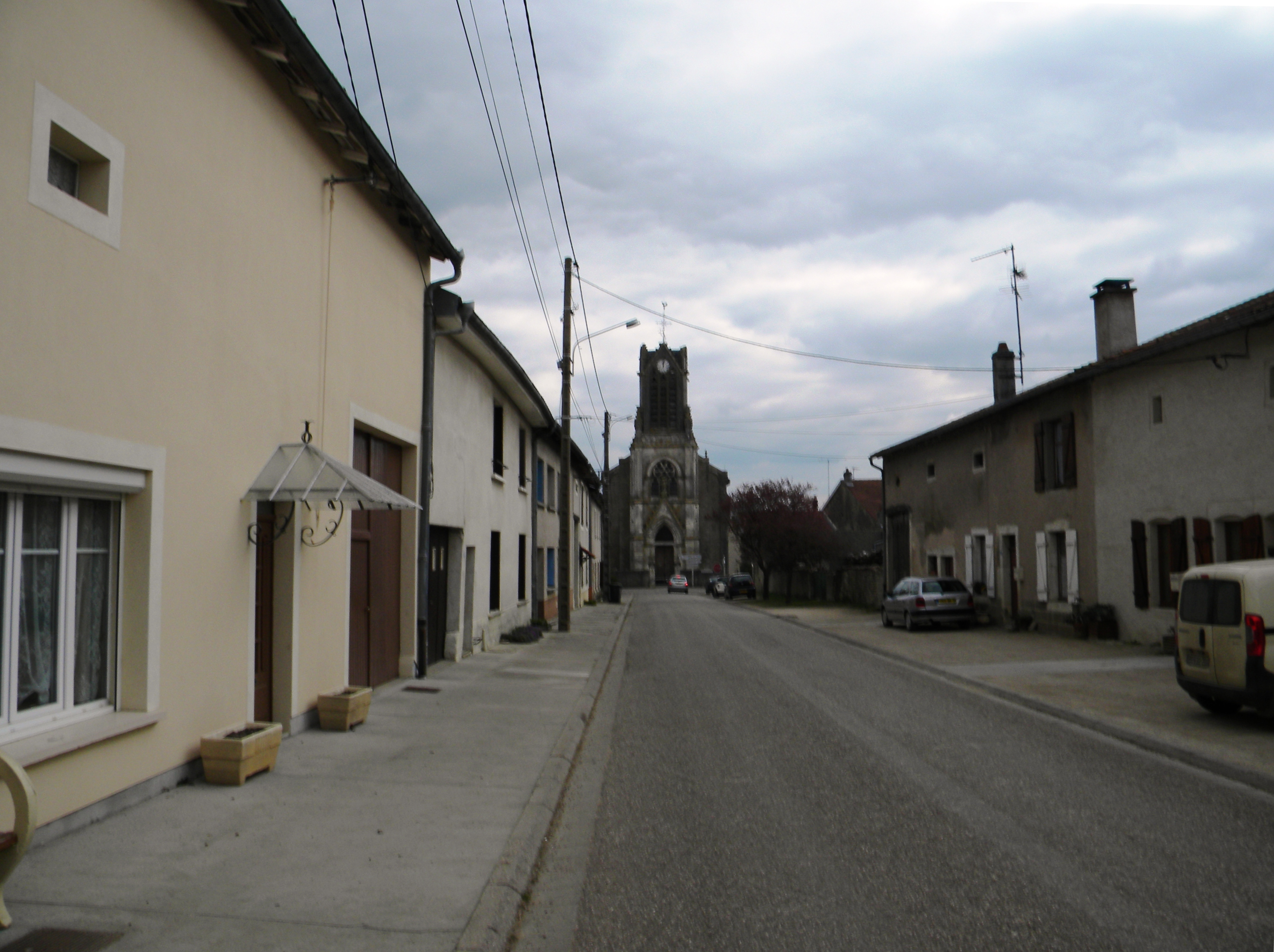 Royaumeix